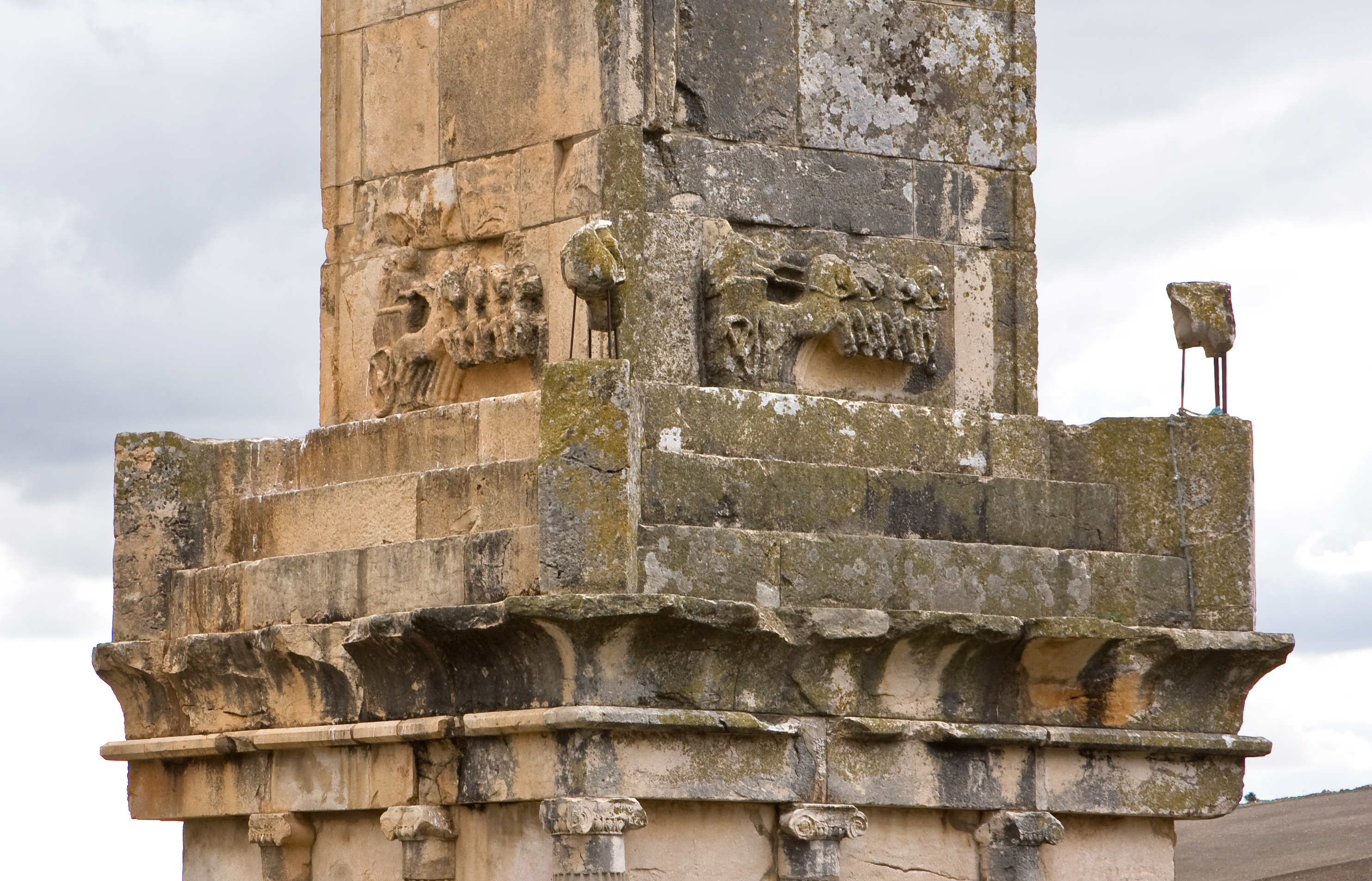 Grand mausolée, Dougga